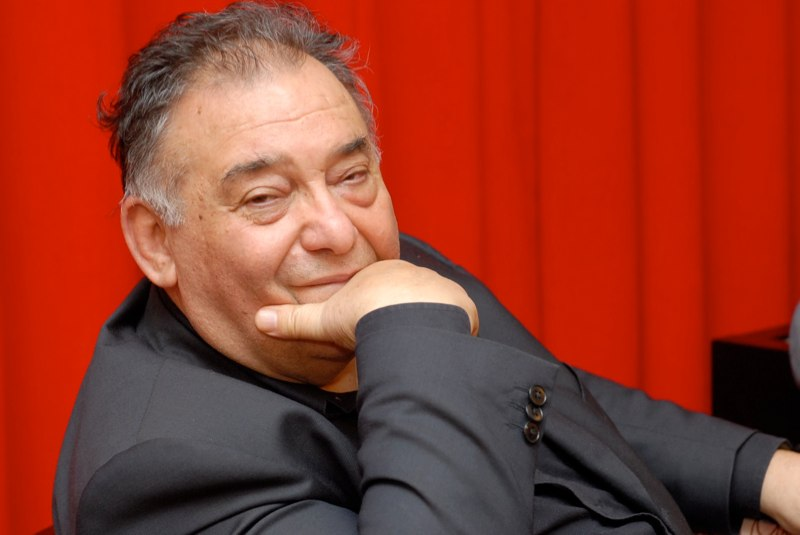 Edoardo Boncinelli